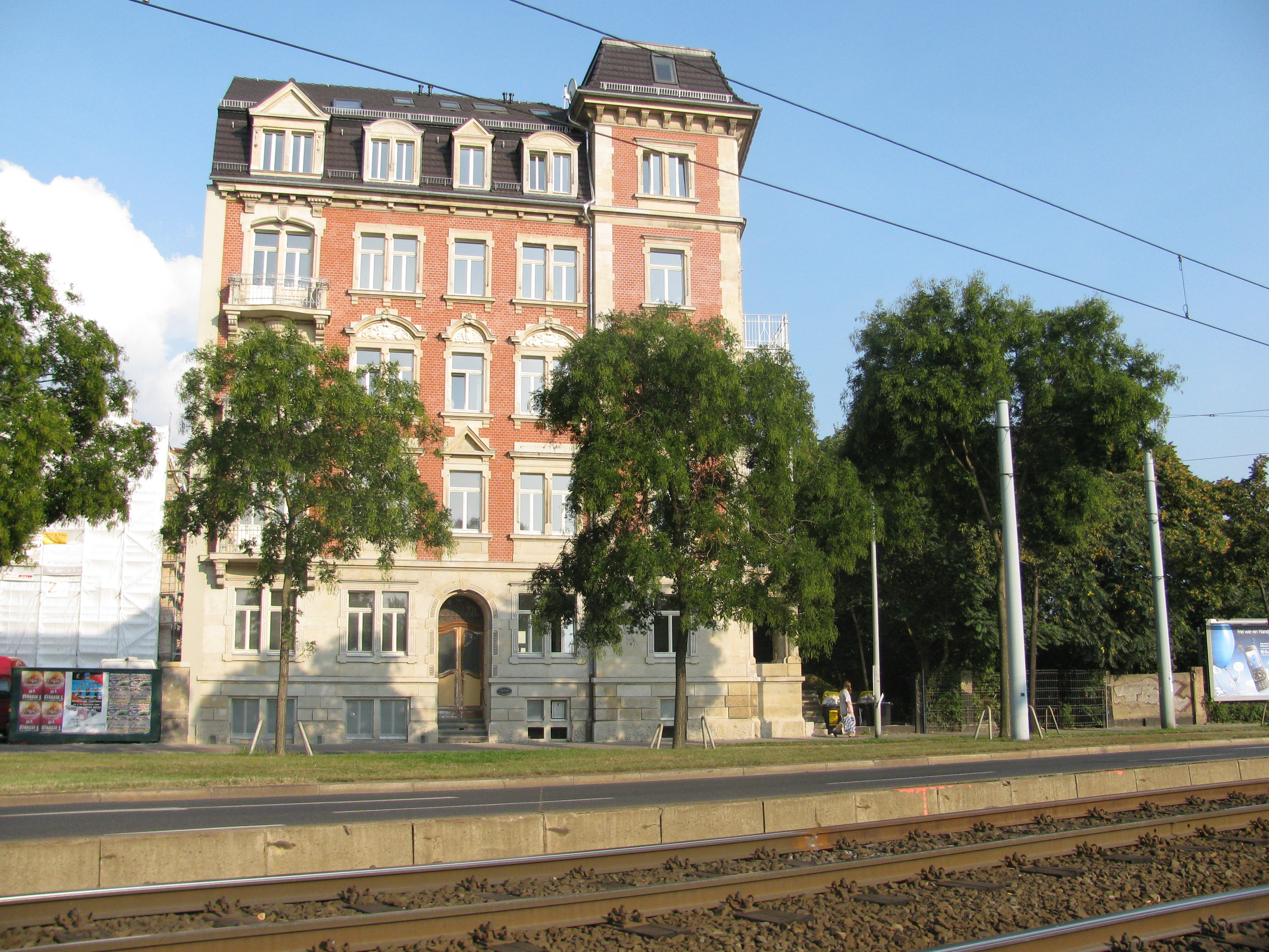 Gründerzeitbebauung an der Hansastraße, Dresden